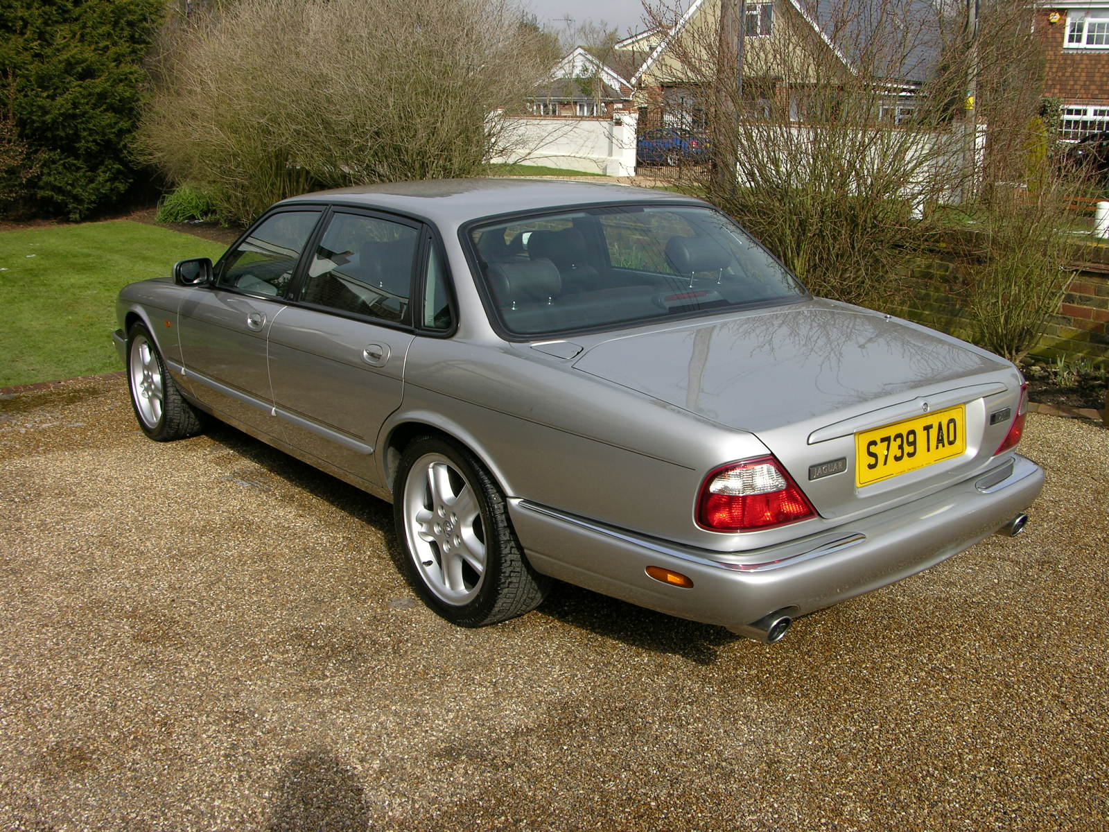 Jaguar XJR 1998